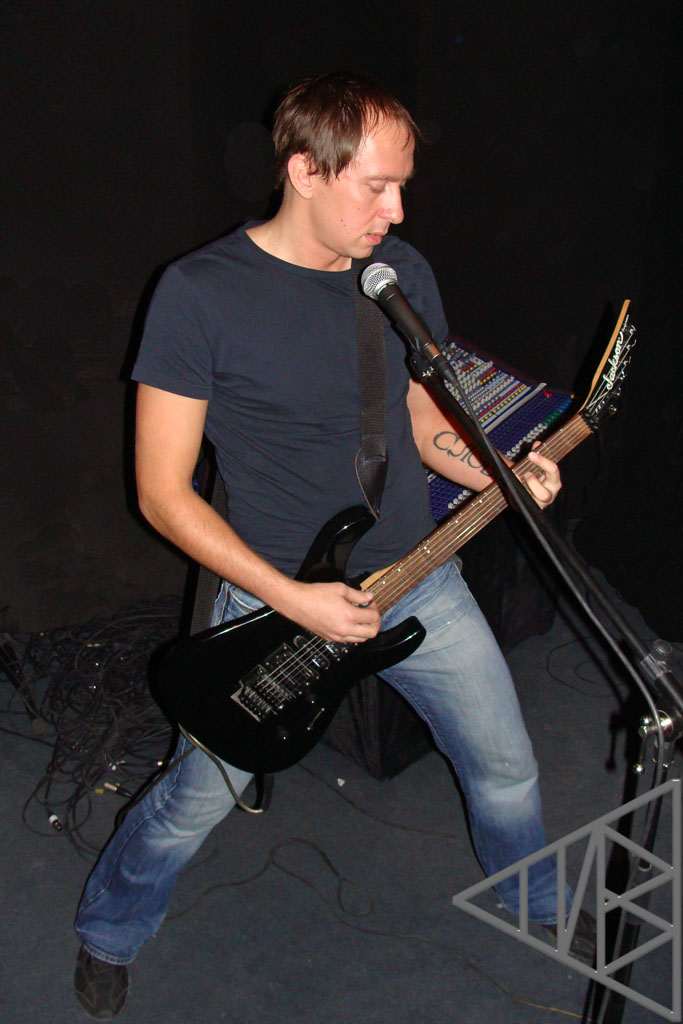 Стиз Андрей репетиция